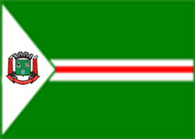 Bandeira da cidade de: Várzea Paulista, São Paulo, Brasil